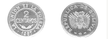 Moneda c2